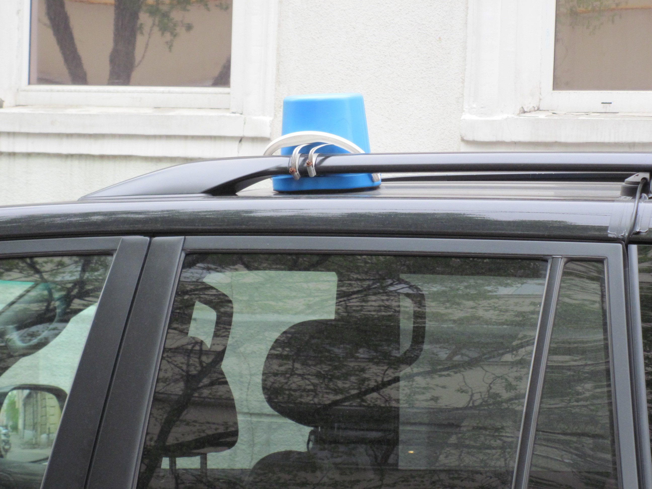 Синее ведёрко на одном из автомобилей в центре Москвы